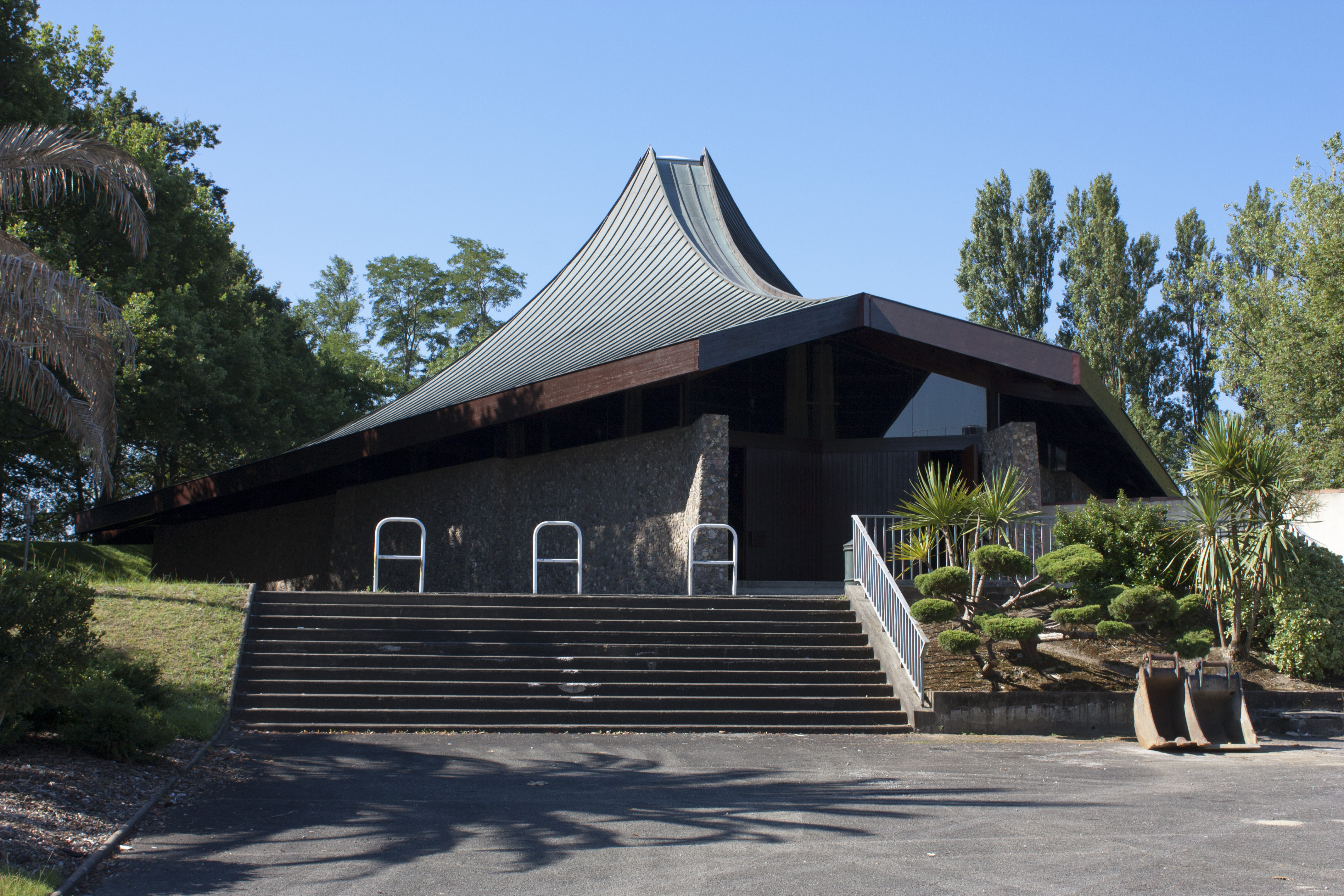 Église paroissiale Sainte-Croix